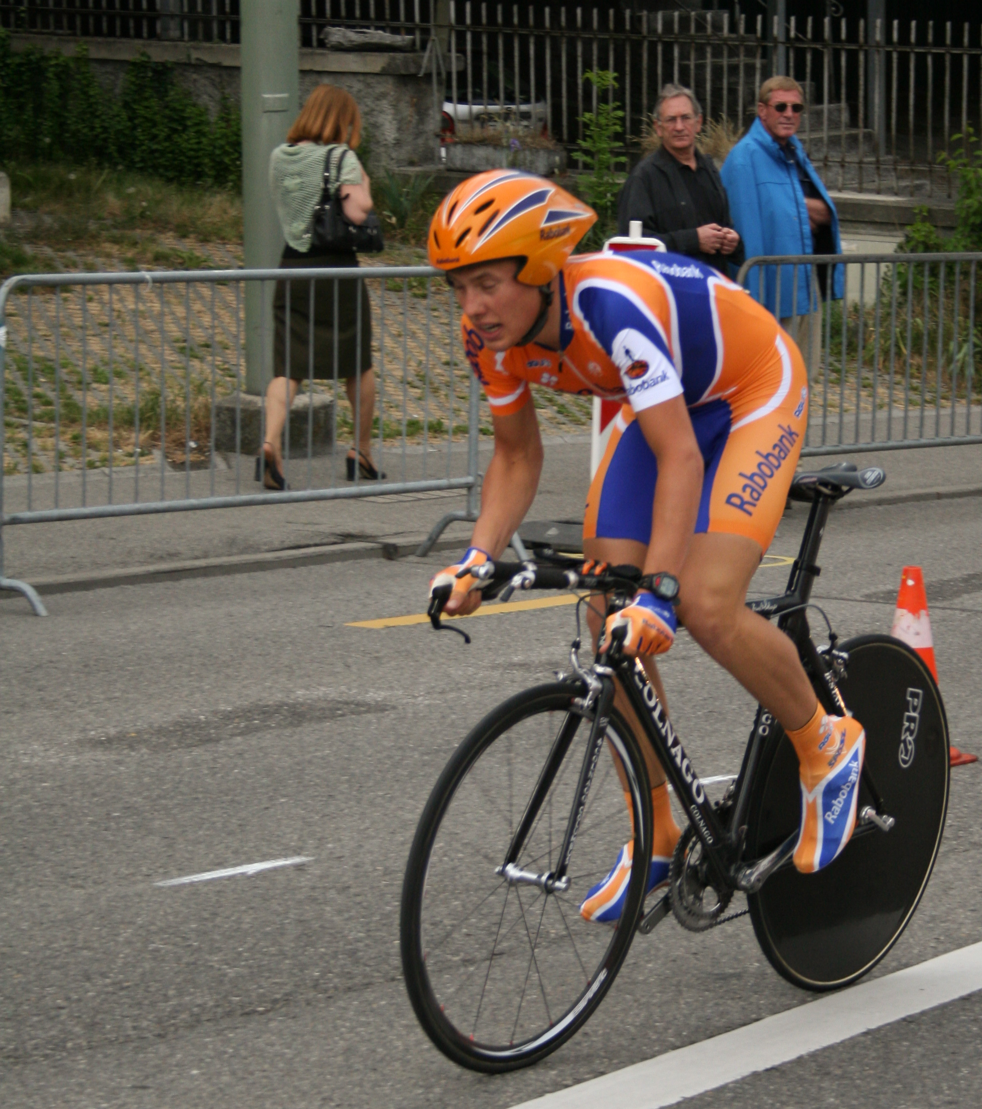 Sebastian Langeveld prologue du Tour de Romandie 2007